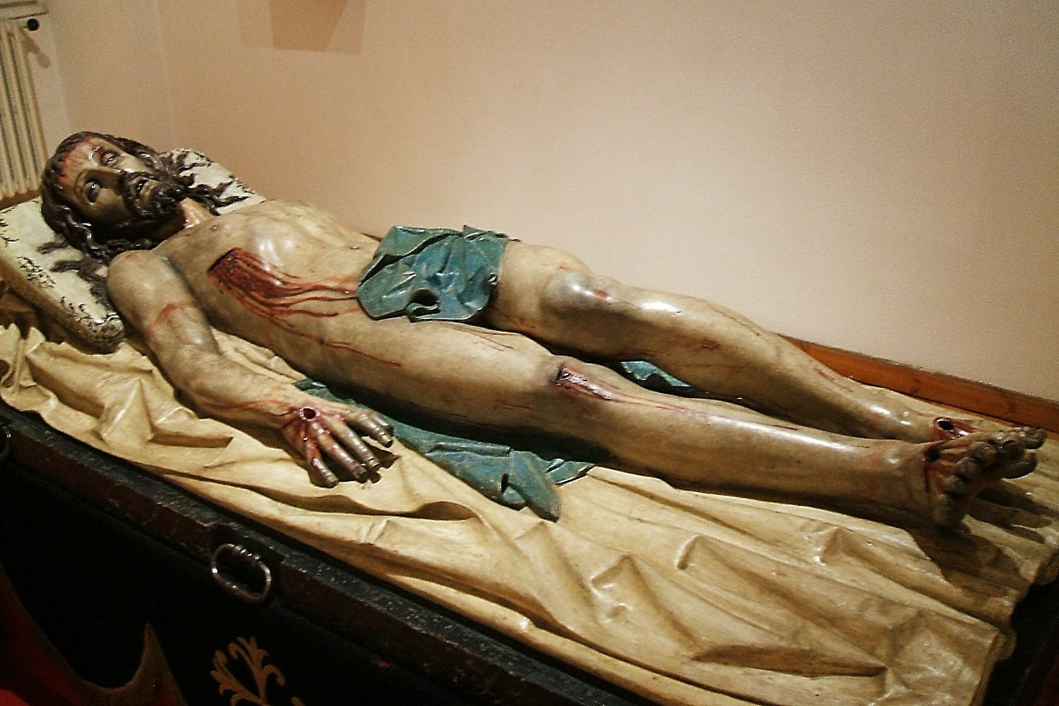 Cristo Yacente, obra de Gregorio Fernández (1634), en el Museo del Real Monasterio de San Joaquín y Santa Ana (MM Cistercienses), Valladolid, España/Spain